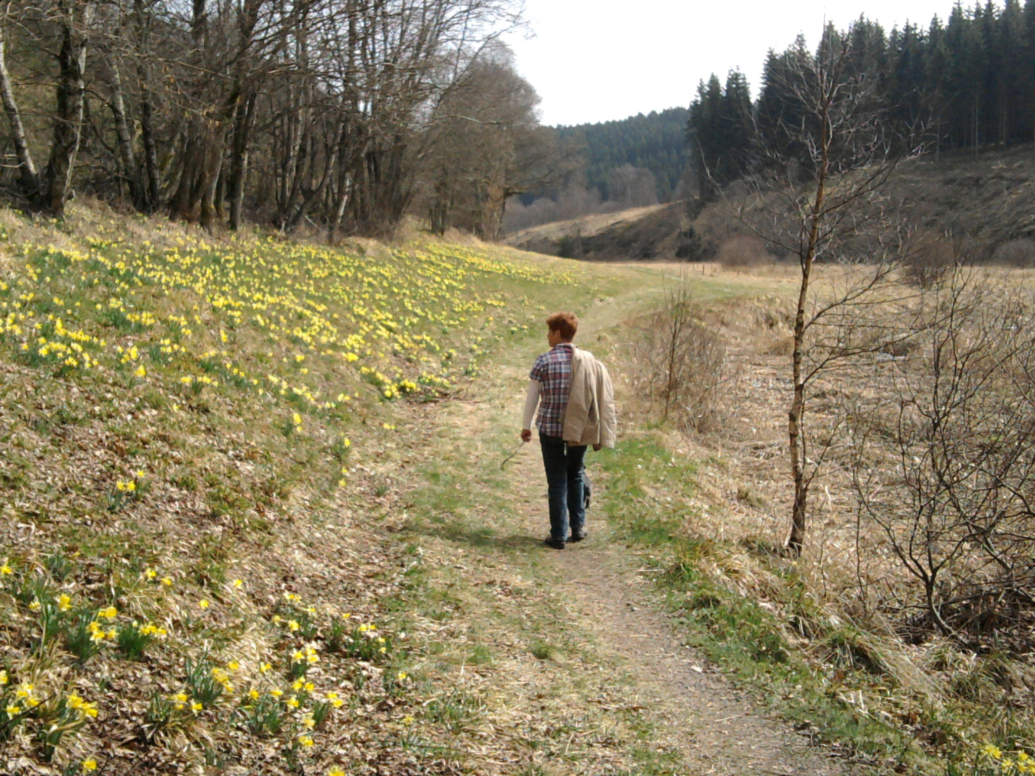 Oberes Perlenbachtal in Belgien (hier Schwalmbach genannt) im März 2014